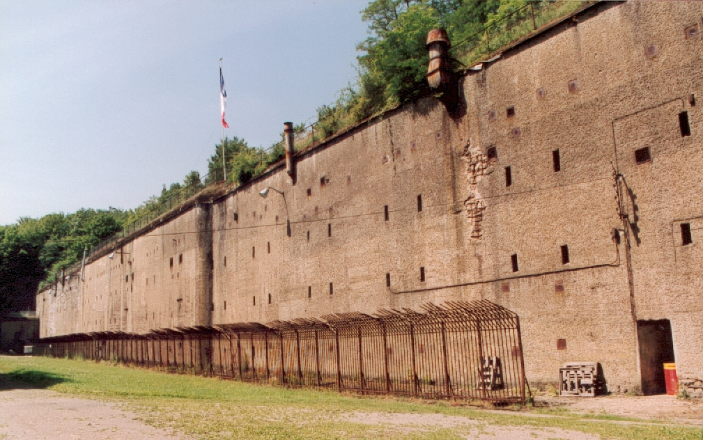 Haupt- oder Mittelkaserne der Festen Ober Gentringen bei Thionville